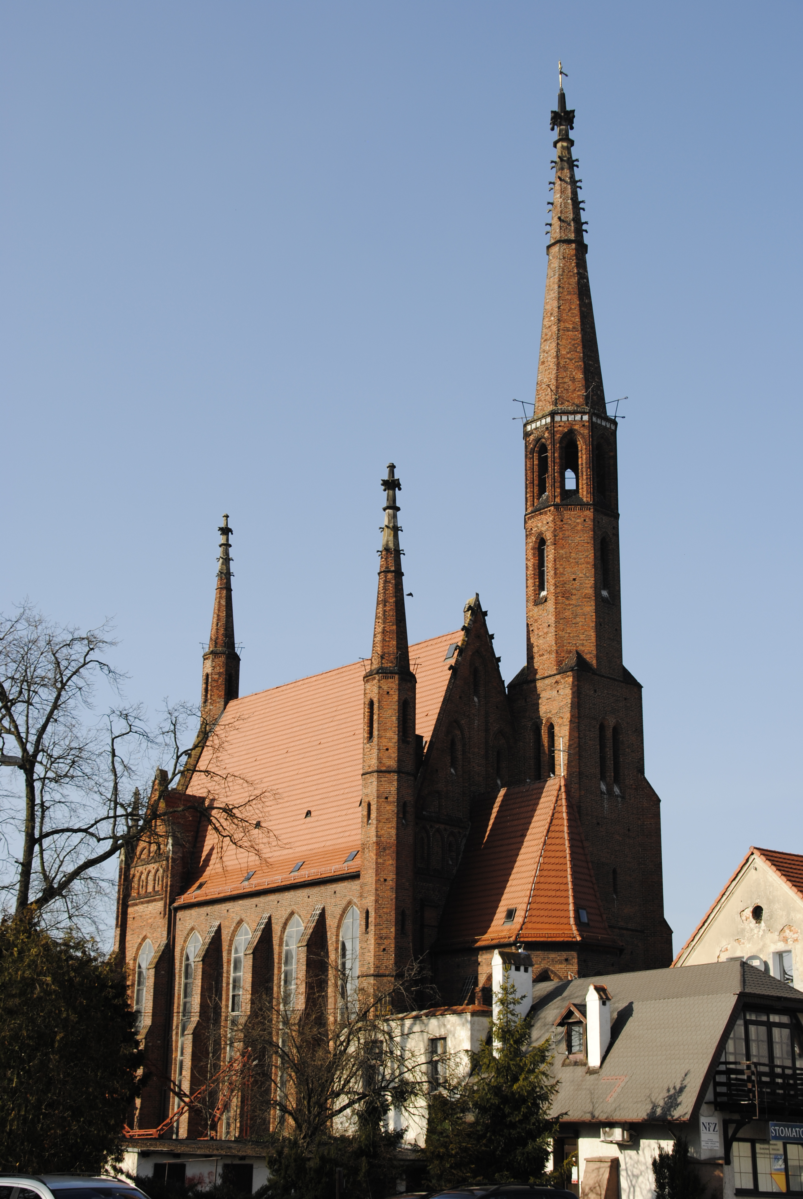 Mariä-Empfängnis-Kirche in Konstadt Oberschlesien